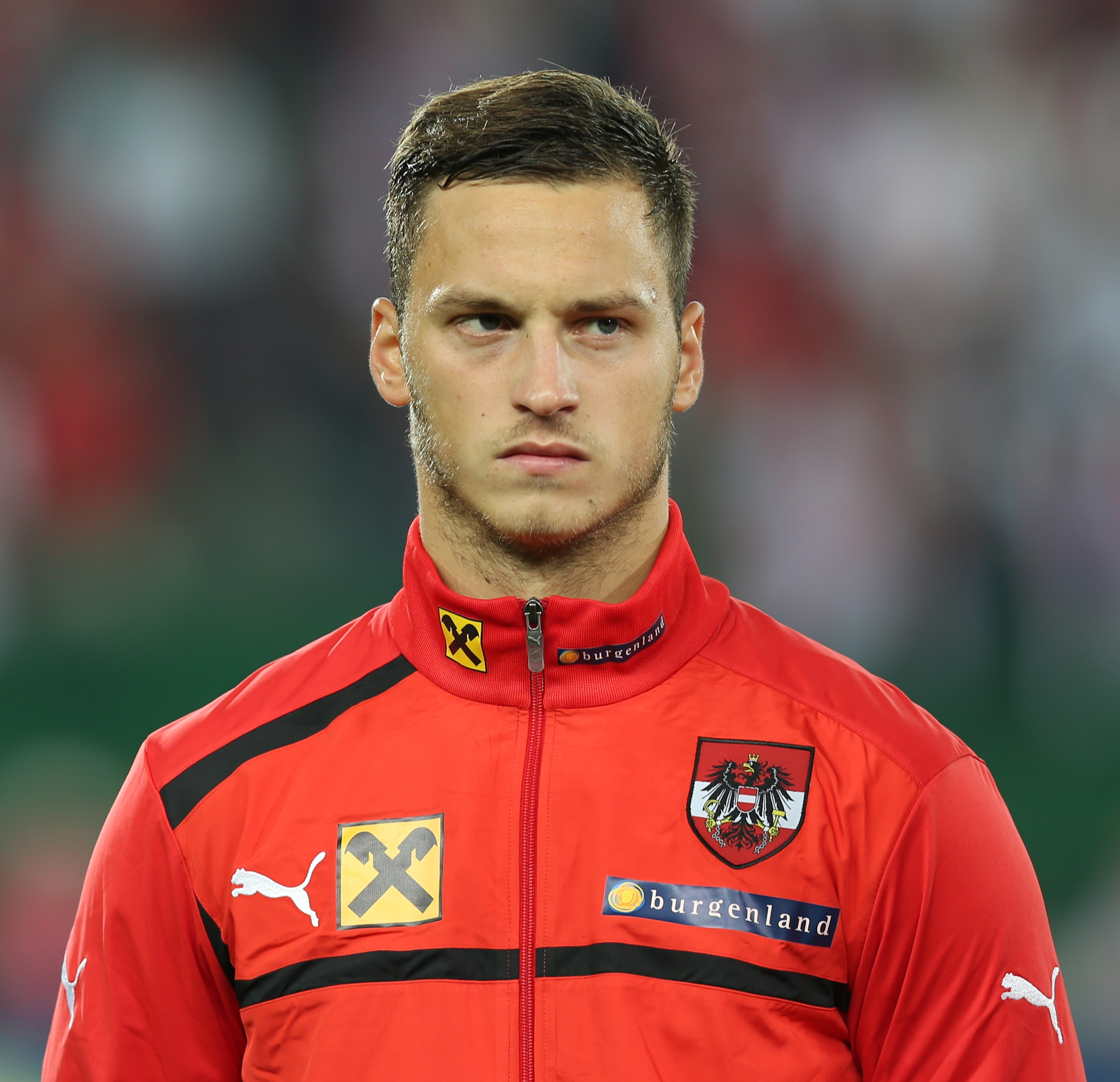 Fußball-Weltmeisterschaft 2014/Qualifikation (UEFA), Gruppe C, 11. September 2012, Österreich gegen Deutschland im Wiener Ernst-Happel-Stadion. The making of this work was supported by Wikimedia Austria. For other files made with the support of Wikimedia Austria, please see the category Supported by Wikimedia Österreich.